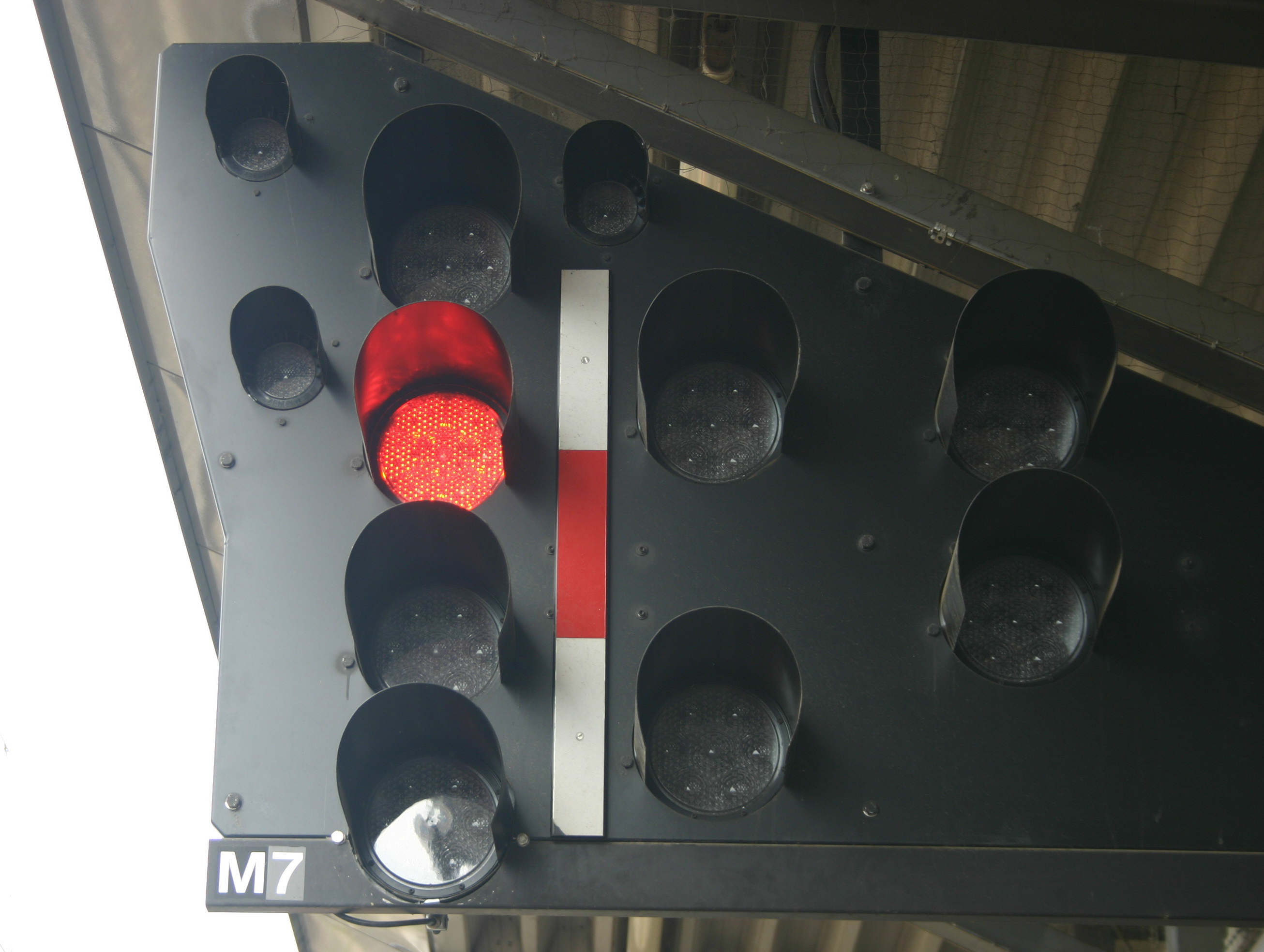 Signal am Grazer Hauptbahnhof Bahnsteig 1